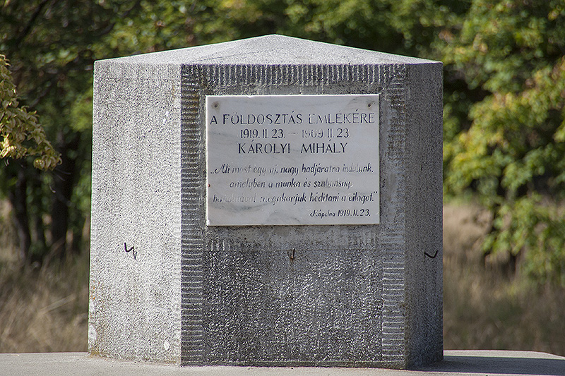 Emlékoszlop